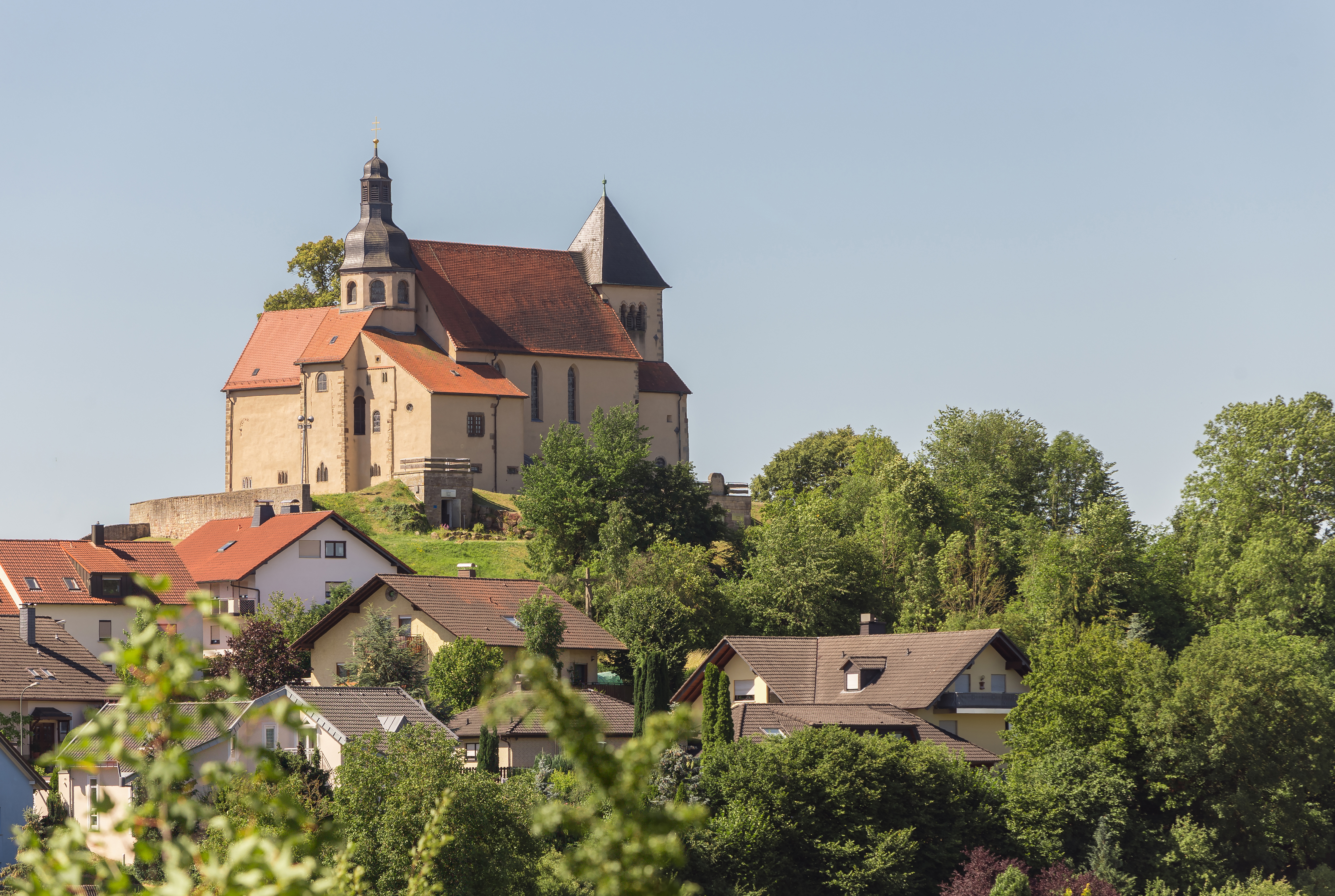 St. Peter (Liobakirche)